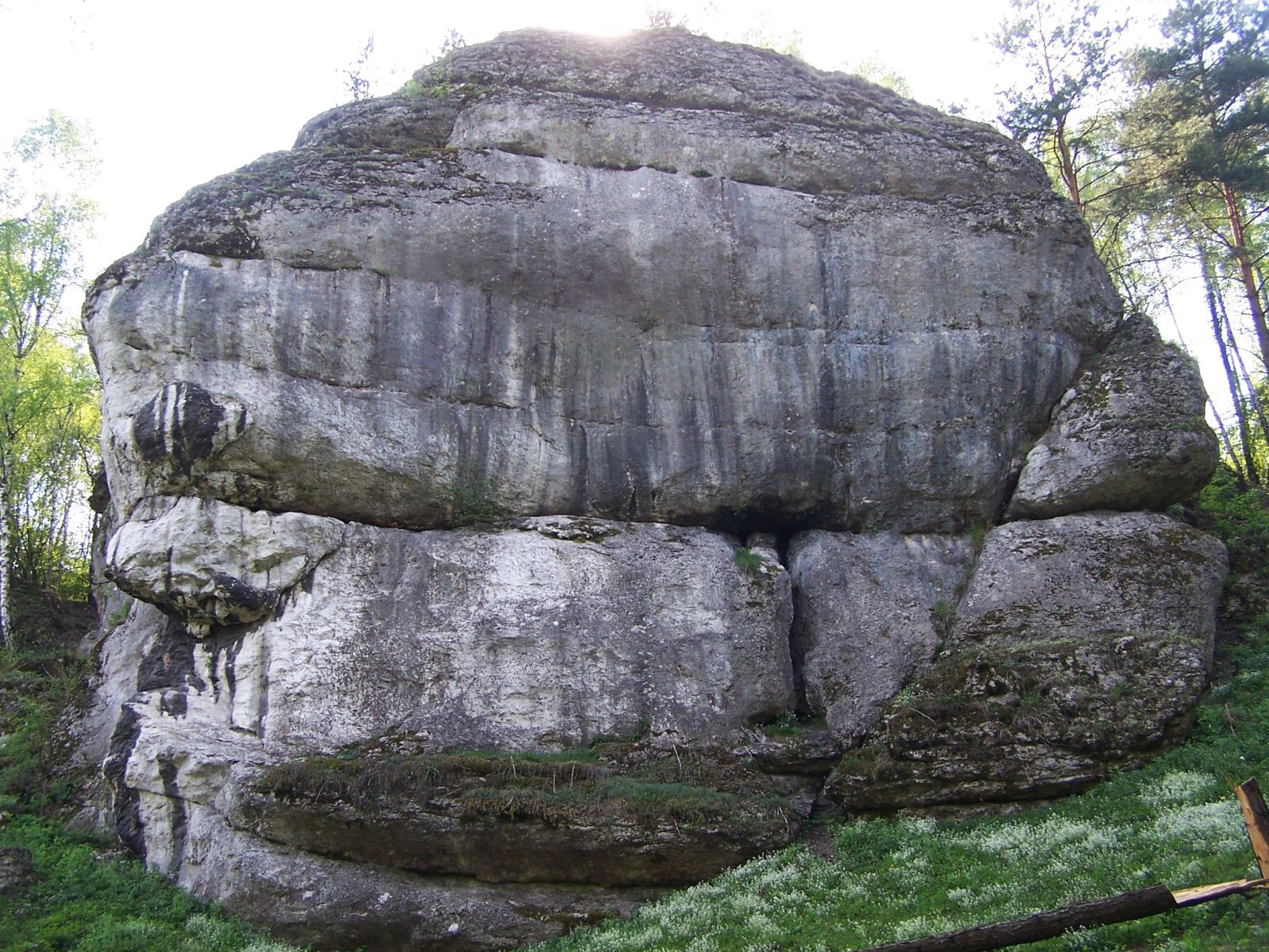 Dolina Brzoskwinki (Wyżyna Krakowsko-Częstochowska)